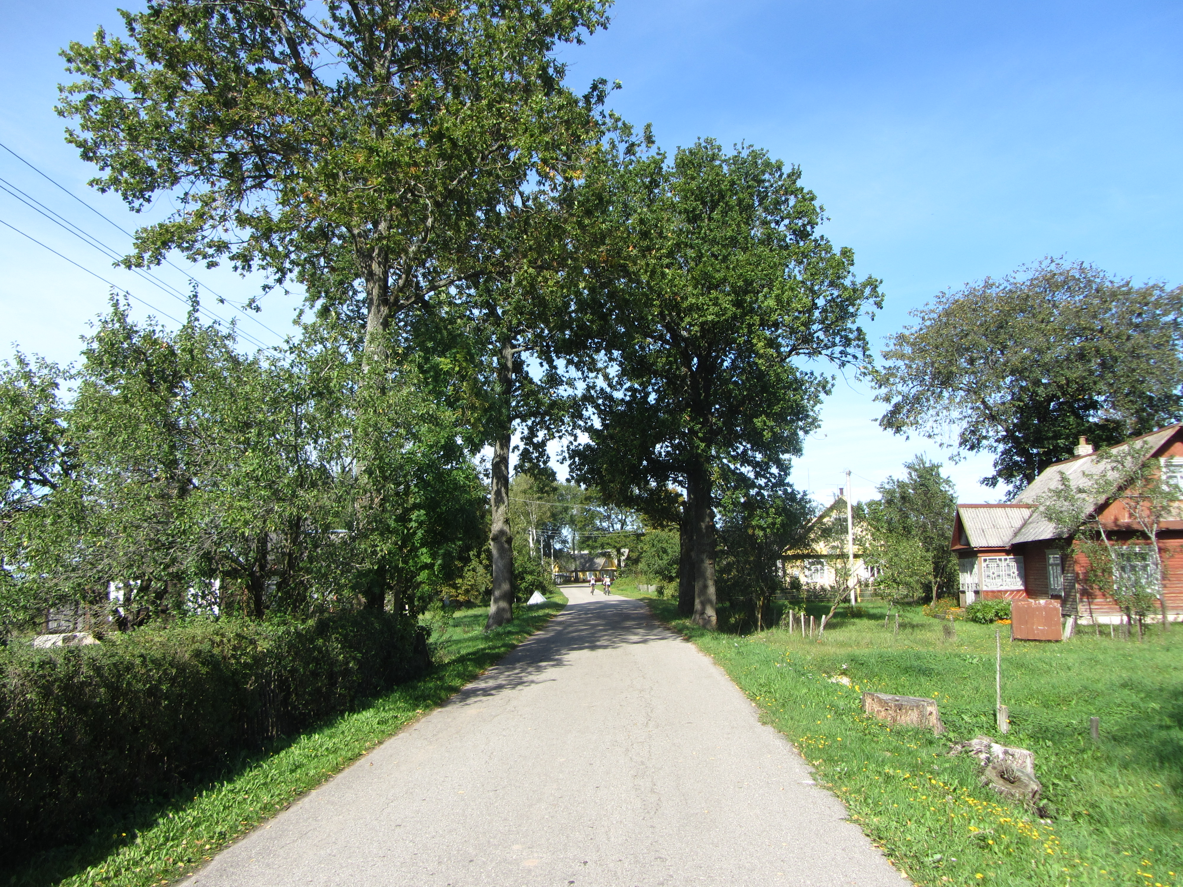 Medeišiai 30273, Lithuania